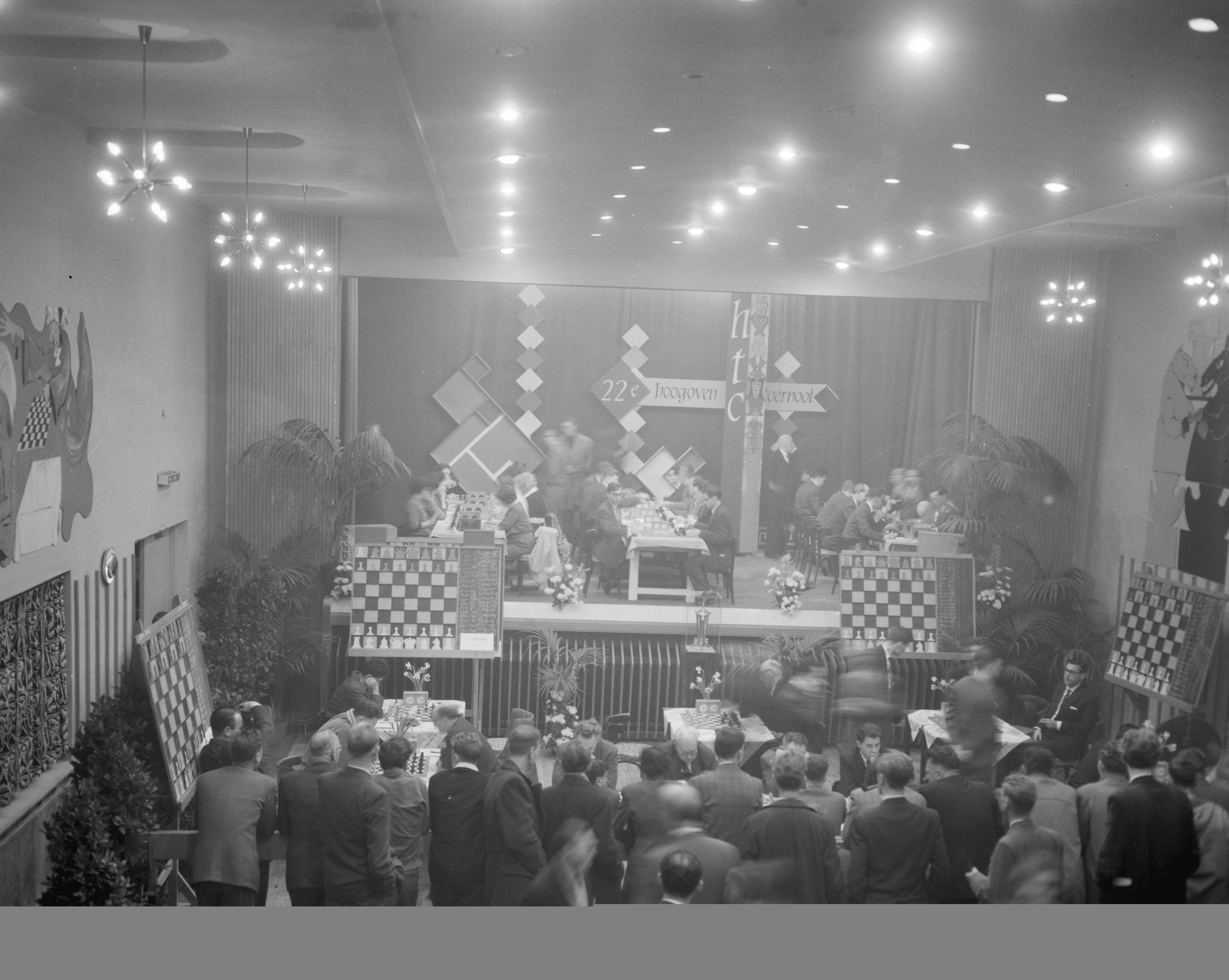 Collectie / Archief : Fotocollectie Anefo Reportage / Serie : [ onbekend ] Beschrijving : Begin van de 22ste Hoogovenschaaktoernooi te Beverwijk Datum : 7 januari 1960 Locatie : Beverwijk Instellingsnaam : Hoogovenschaaktournooi Fotograaf : Bilsen, Joop van / Anefo Auteursrechthebbende : Nationaal Archief Materiaalsoort : Negatief (zwart/wit) Nummer archiefinventaris : bekijk toegang 2.24.01.04 Bestanddeelnummer : 910-9237